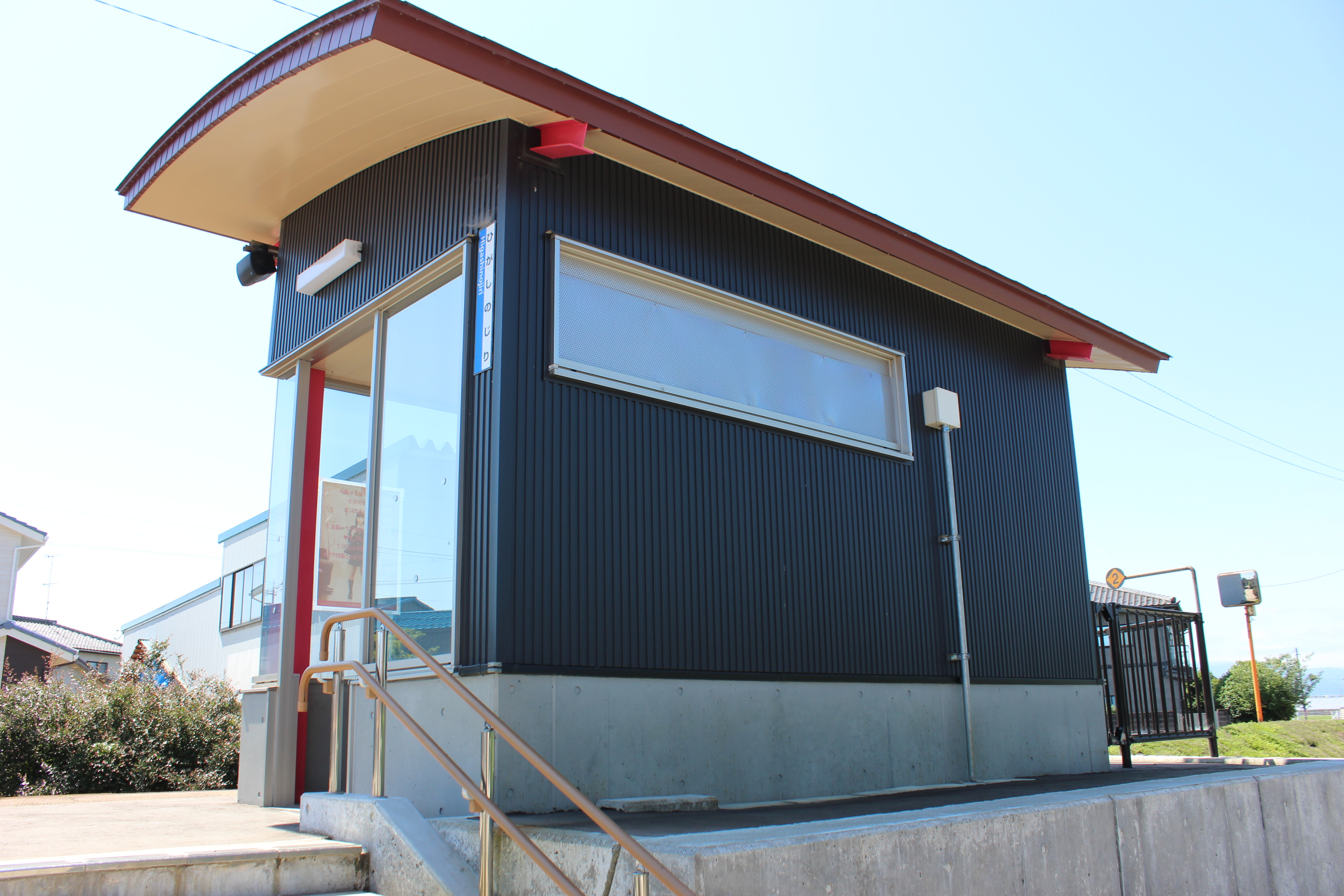 JR城端線東野尻駅（富山県砺波市）、ホーム上は待合室のみとなっている。 Canon EOS Kiss X5